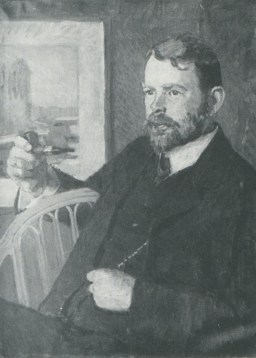 Portrait Friedrich Schaper